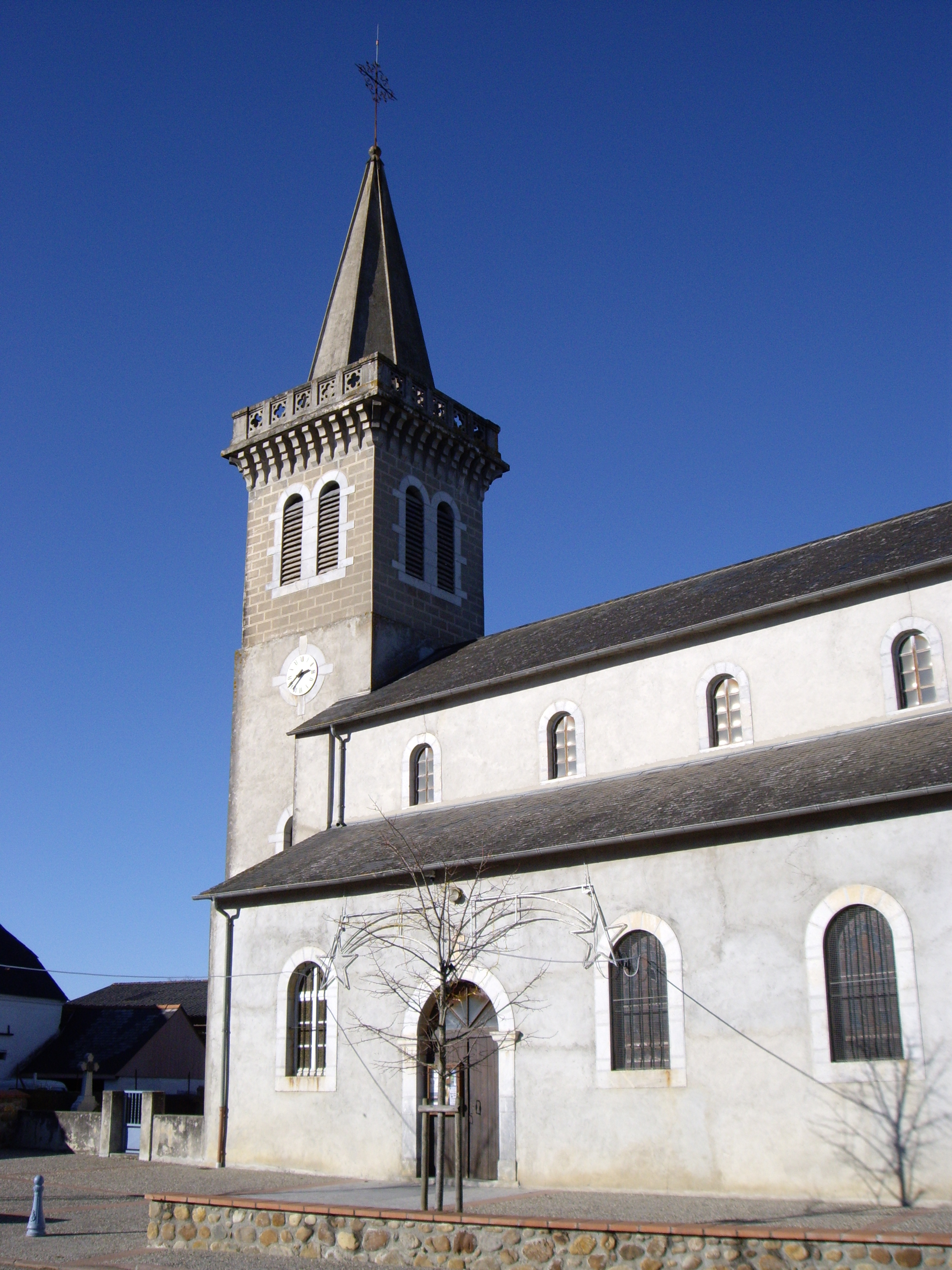 Église Saint-Laurent de Luquet